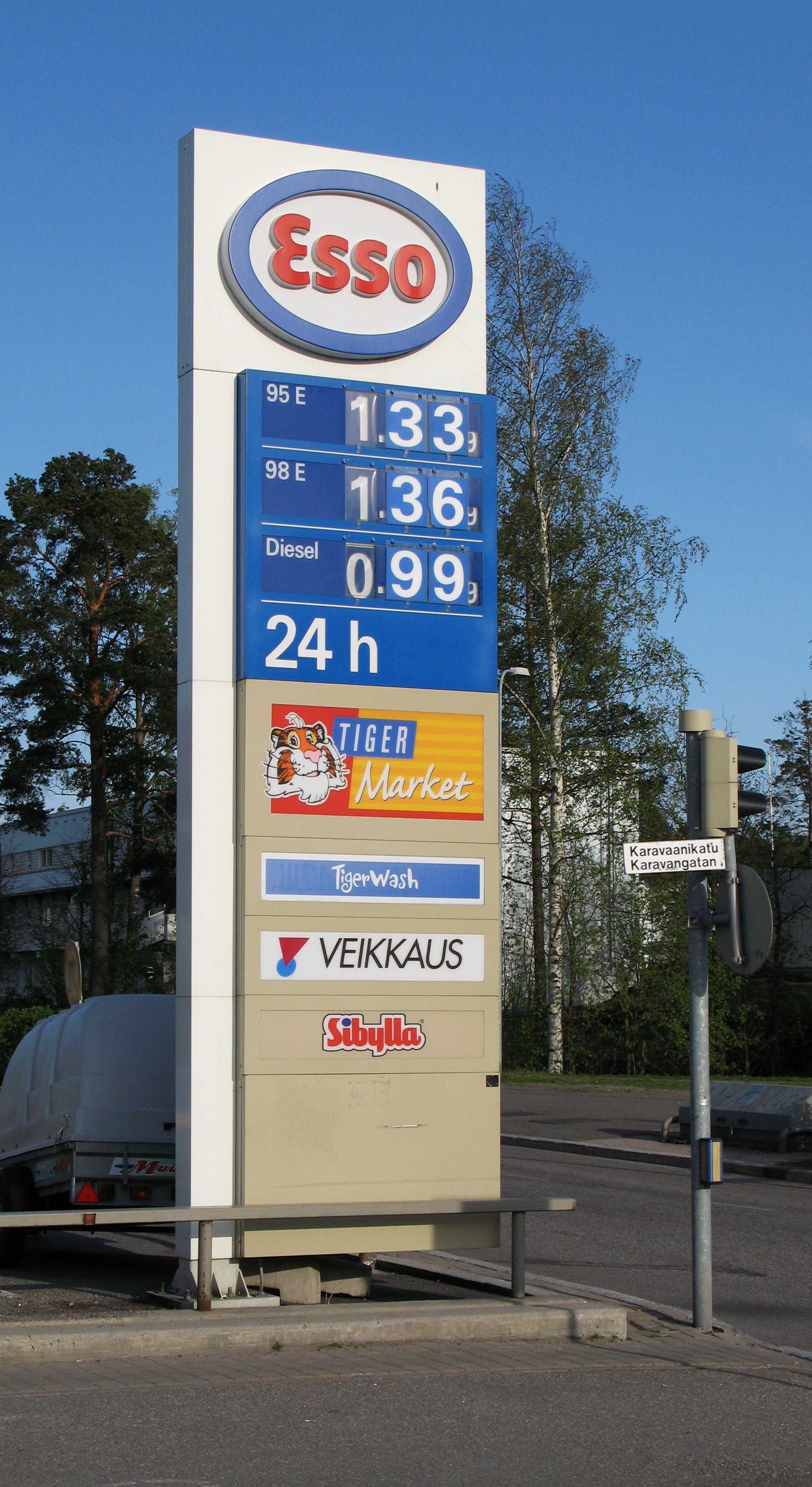 Esso